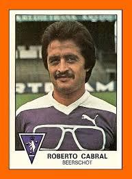 Roberto Cabral en Beerschot